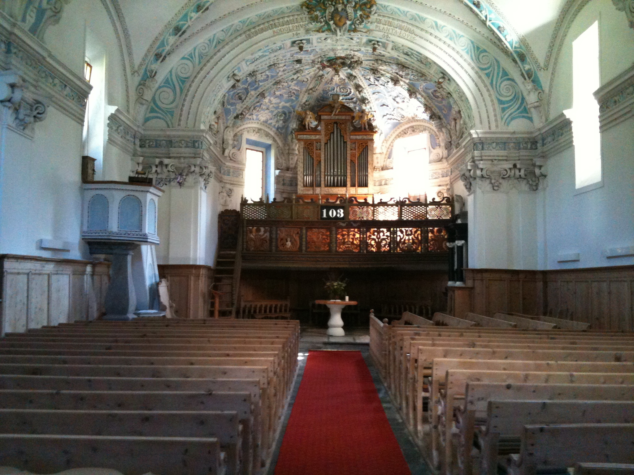 reformierte Kirche Zernez, Unterengadin (Kanton Graubünden, CH)